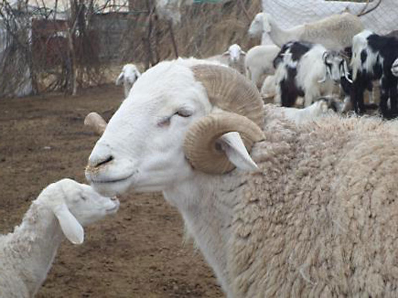 ولاد جلال